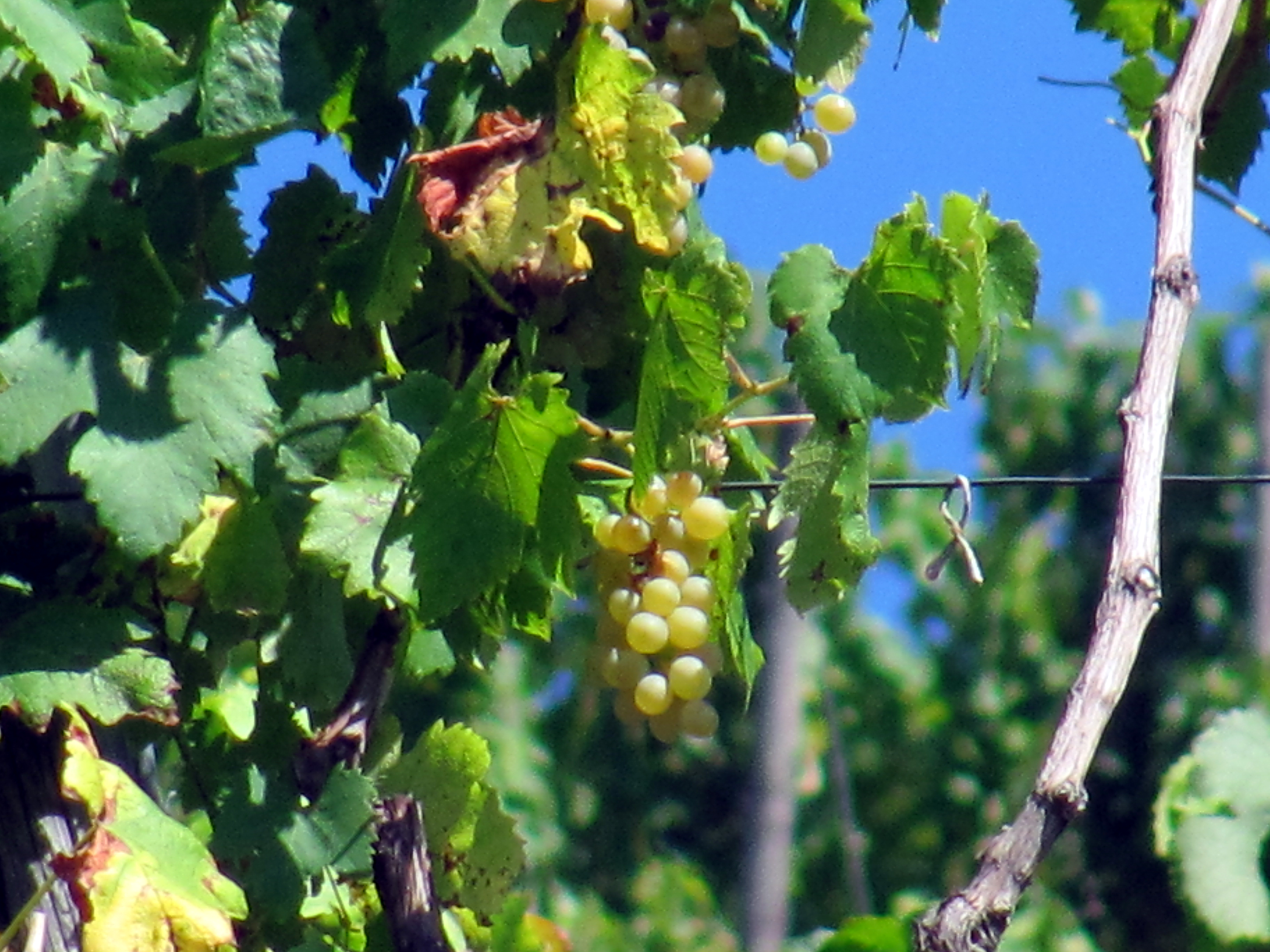 Radebeul-Oberlößnitz, Goldener Wagen, Traube des jahrhundertealten Prié Blanc im September 2013